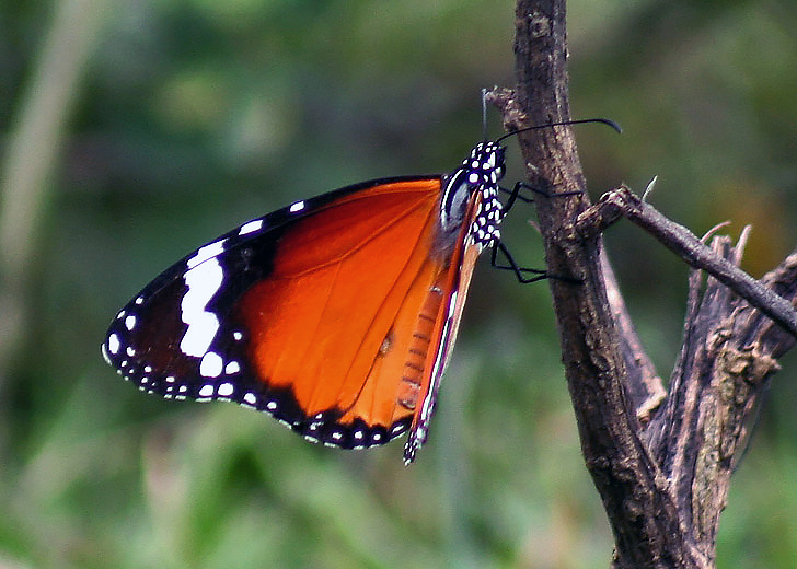 Plain Tiger Danaus chrysippus in Kolkata, West Bengal, India.